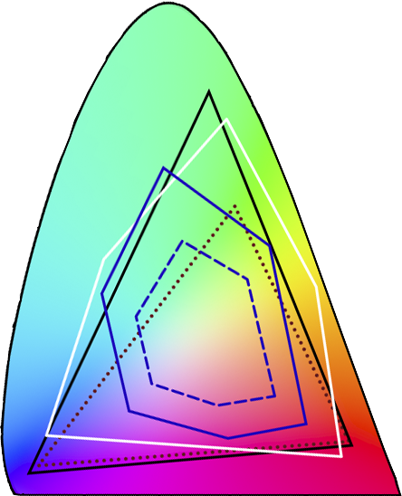 Цветовой охват (color gamut) различных цветовоспроизводящих устройств в модели CIE XYZ